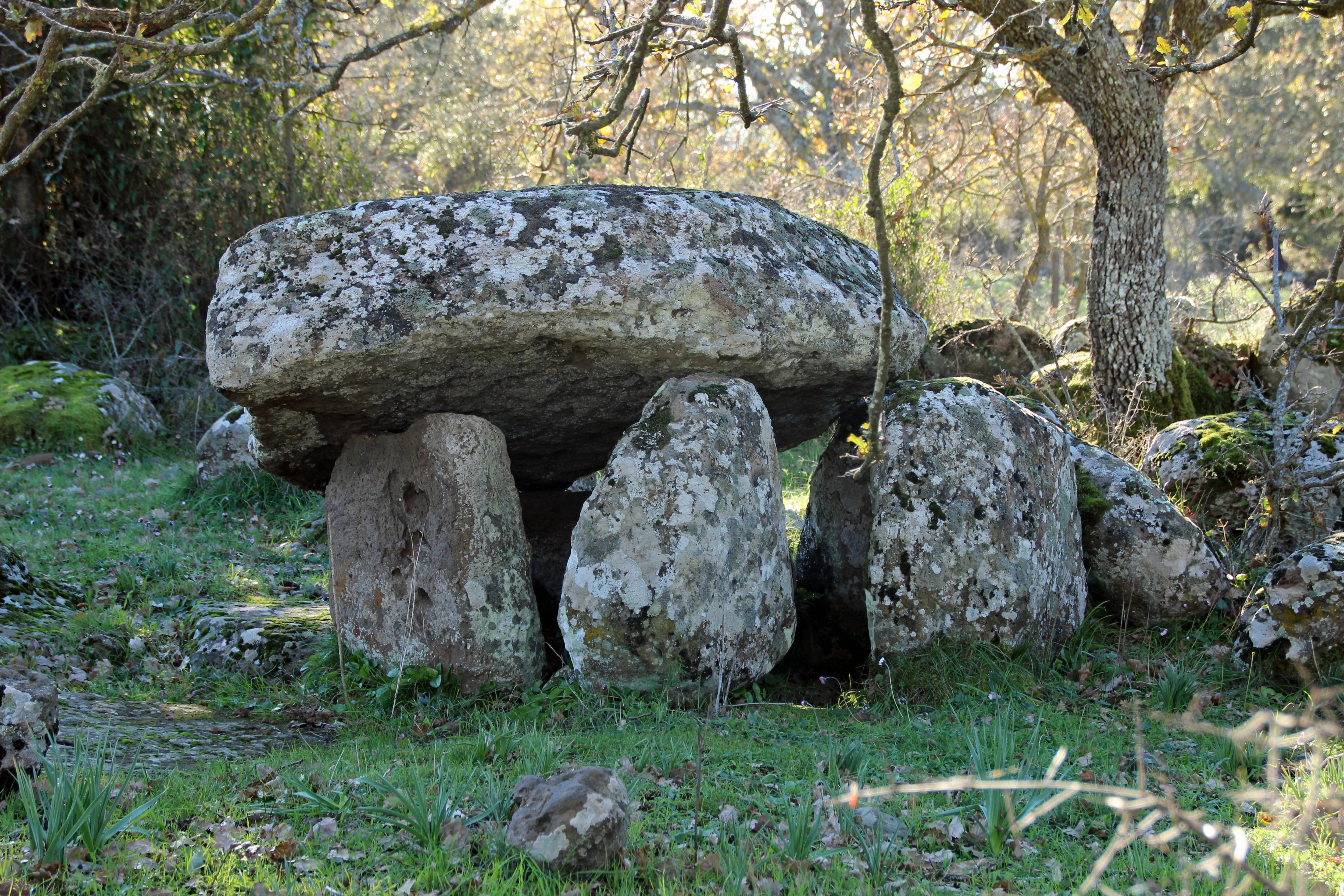 altopiano di Abbasanta (Q55254670)